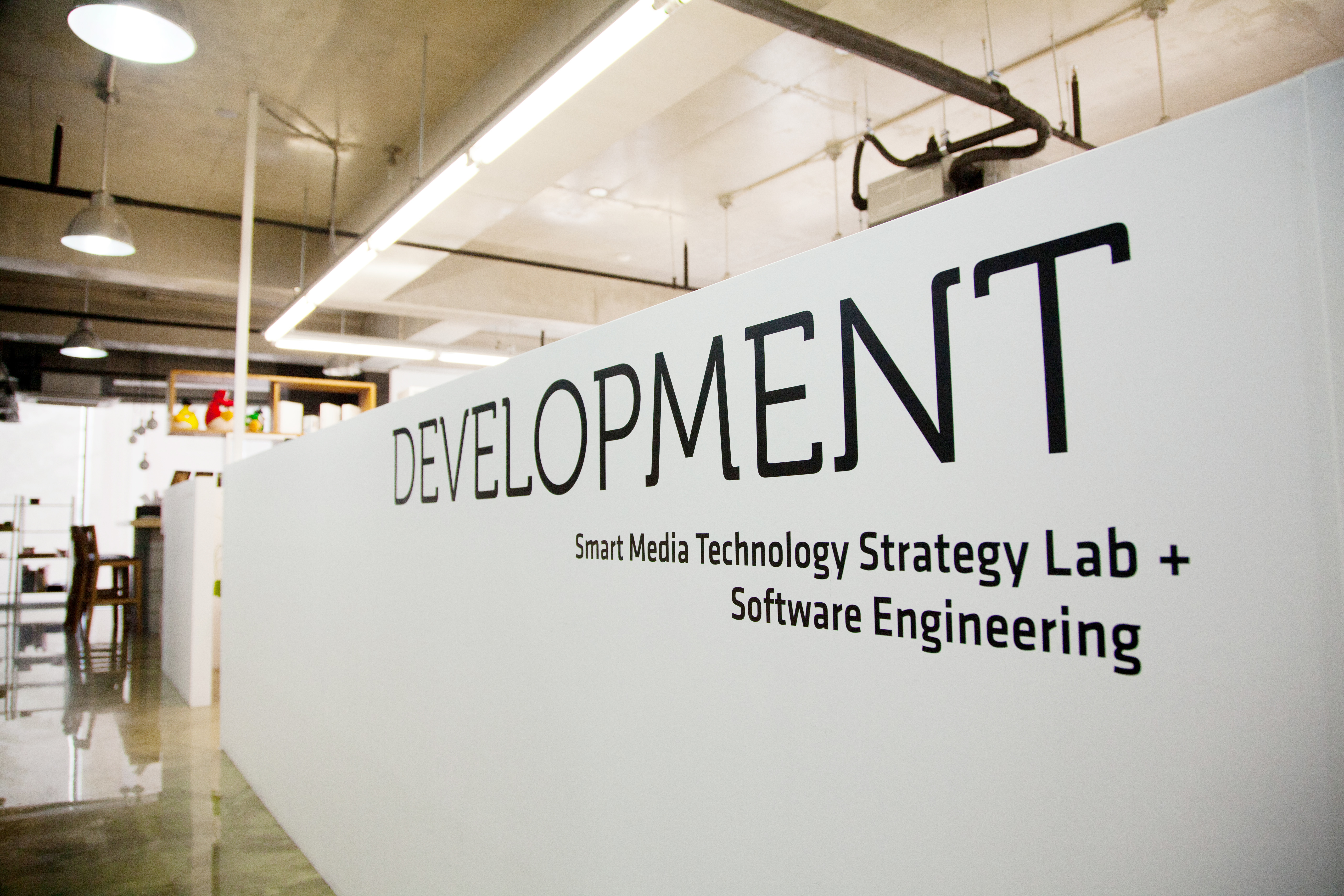 핸드스튜디오 사무실 사진